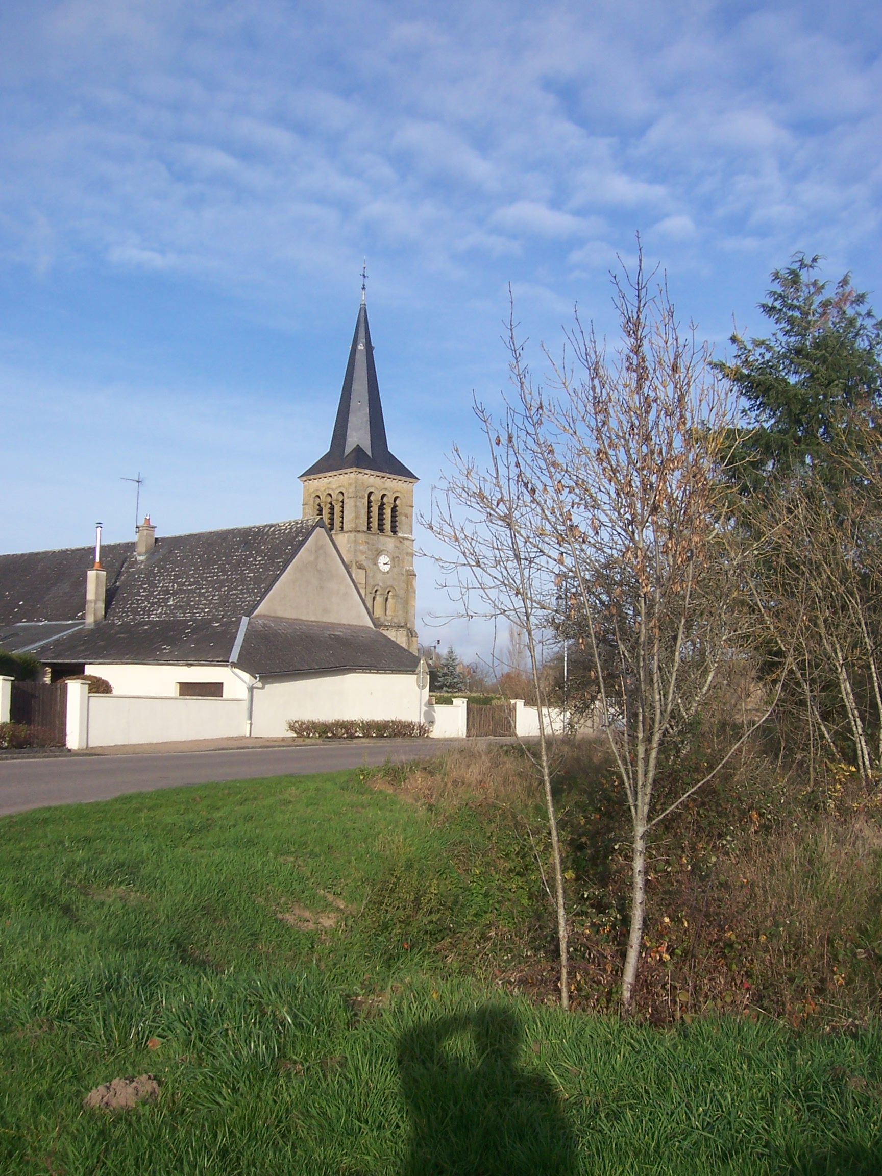 Eglise de Monthelon